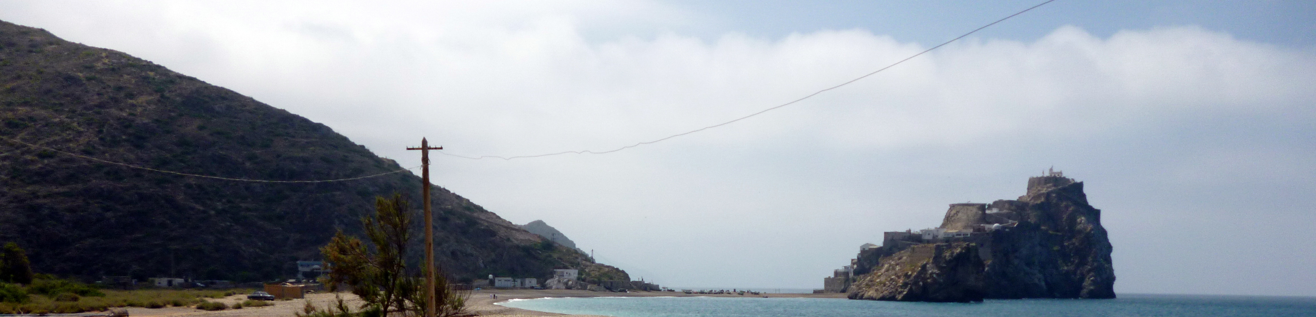 Peñón de Vélez de la Gomera